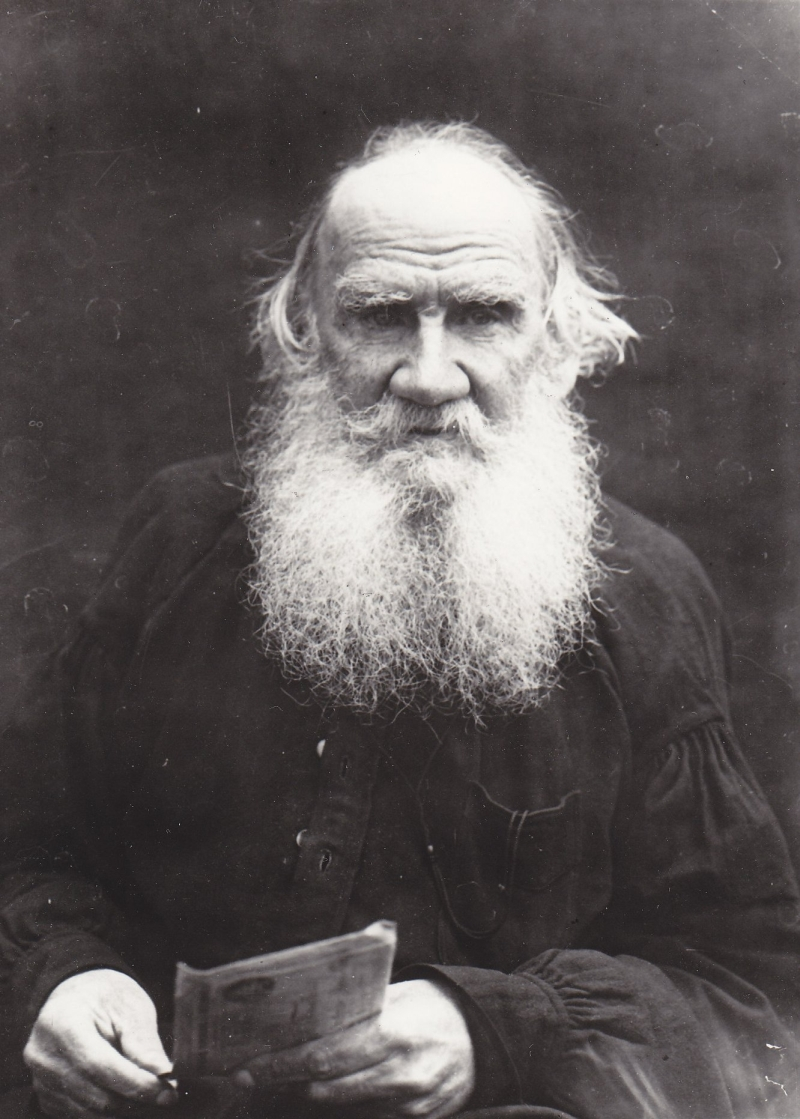 Русский писатель Лев Толстой (1828-1910)